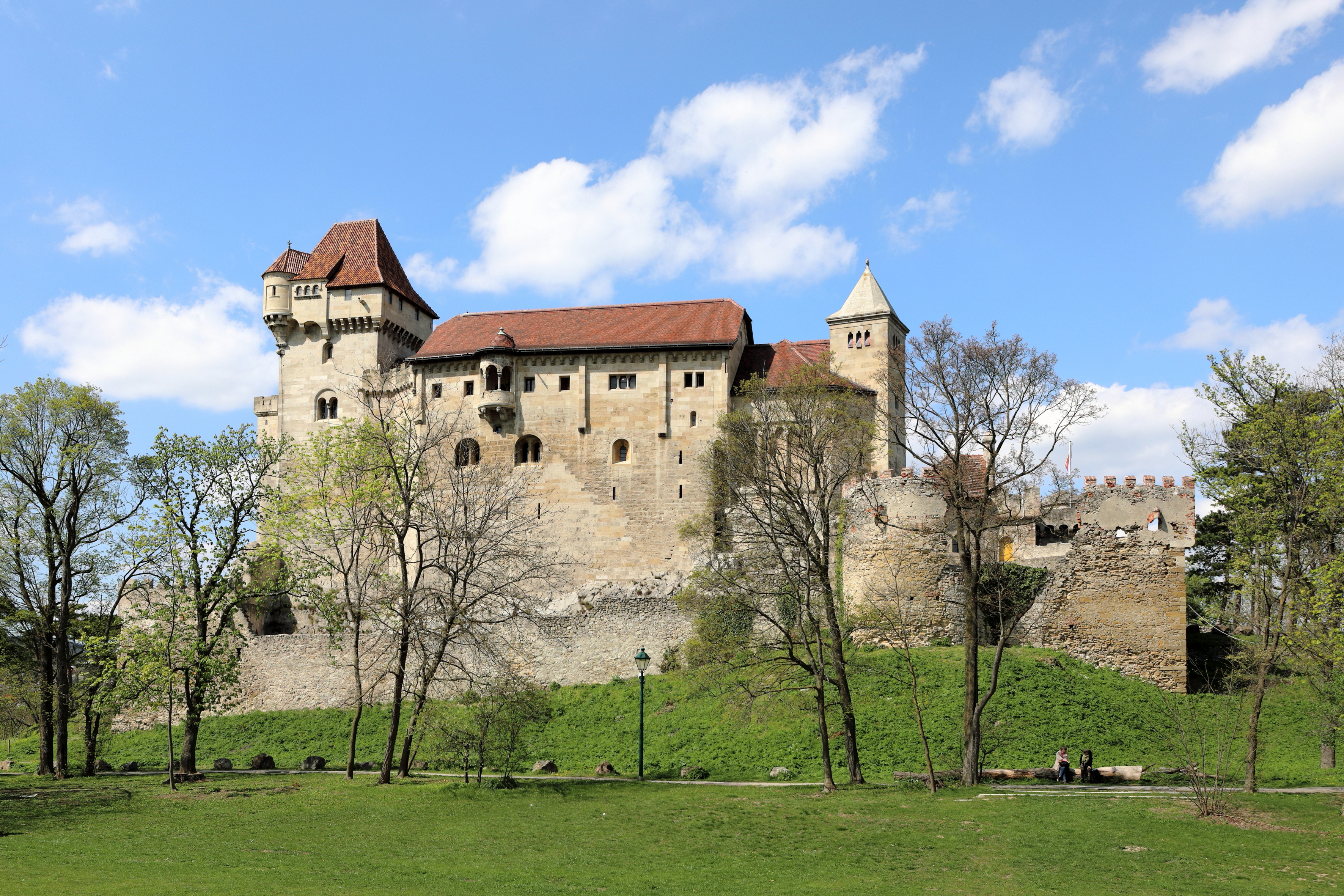 Südostansicht der Burg Liechtenstein in der niederösterreichischen Marktgemeinde Maria Enzersdorf.Eine weithin sichtbare und hoch aufragende mächtige romanische Burg, die bis ins 17. Jahrhundert mehrfach verändert, erweitert bzw. nach Zerstörungen wiederaufgebaut wurde. Bei der Türkenbelagerung 1683 wurde sie stark beschädigt und war anschließend eine Ruine, die erst ab dem Anfang des 19. Jahrhundert unter Einbeziehung der mittelalterlichen Anlage wiederaufgebaut bzw. rekonstruiert und erweitert wurde.